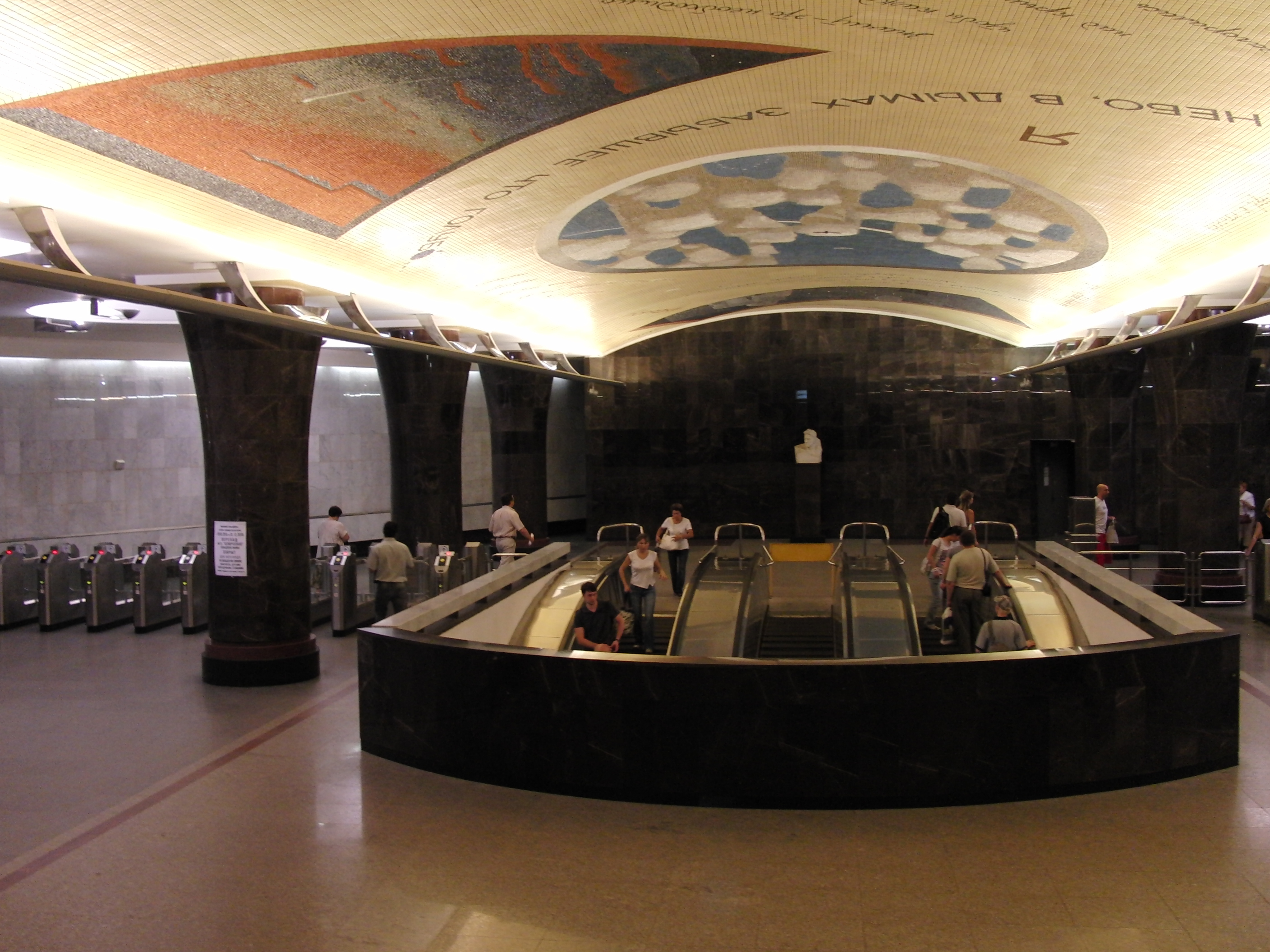 Vestibule of Mayakovskaya station (Вестибюль станции Маяковская)